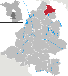 Blankenfelde-Mahlow in Brandenburg (Country) - District Teltow-Fläming